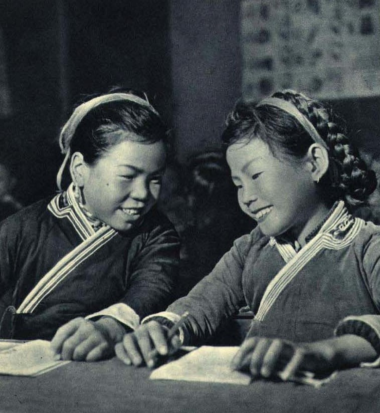 1962-01 1962年 福建罗源县石别下村畲族